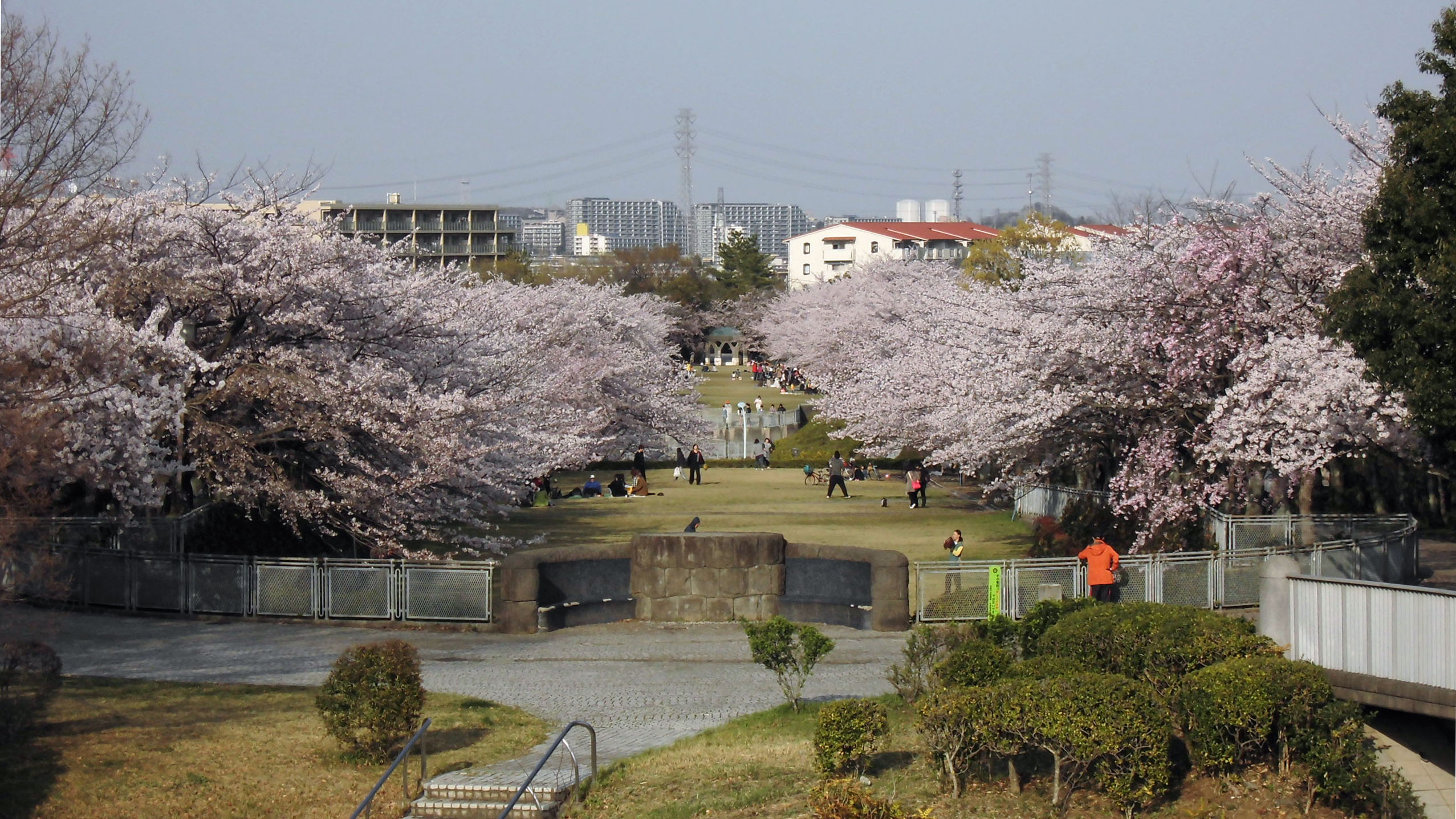 多摩市にある奈良原公園の桜並木。多摩ニュータウン鶴牧・落合地区では、この公園をはじめ特徴的な公園整備がされている。